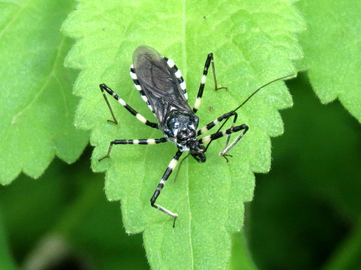 森の下草上のシマサシガメ。ロケーション：相模原市中央区 銀河の森。